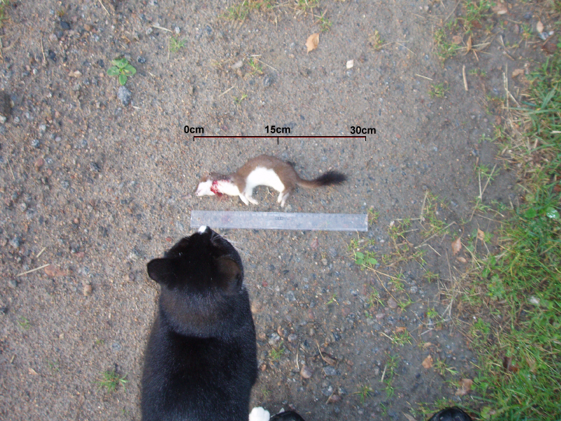 dead Mustela erminea in Finland